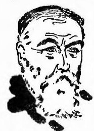 Stanislav Minařík, český nakladatel a překladatel (Lidové noviny 1944)